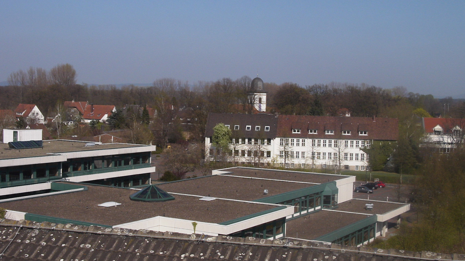 Blick über Verl in Richtung Nordosten; Vorne das Gymnasium, dahinter die Mariengrundschule und im Hintergrund die St. Anna Kirche (kathl.) von Verl. Aufgenommen wurde das Foto vom Dach des Altenzentrums St. Anna Verl.